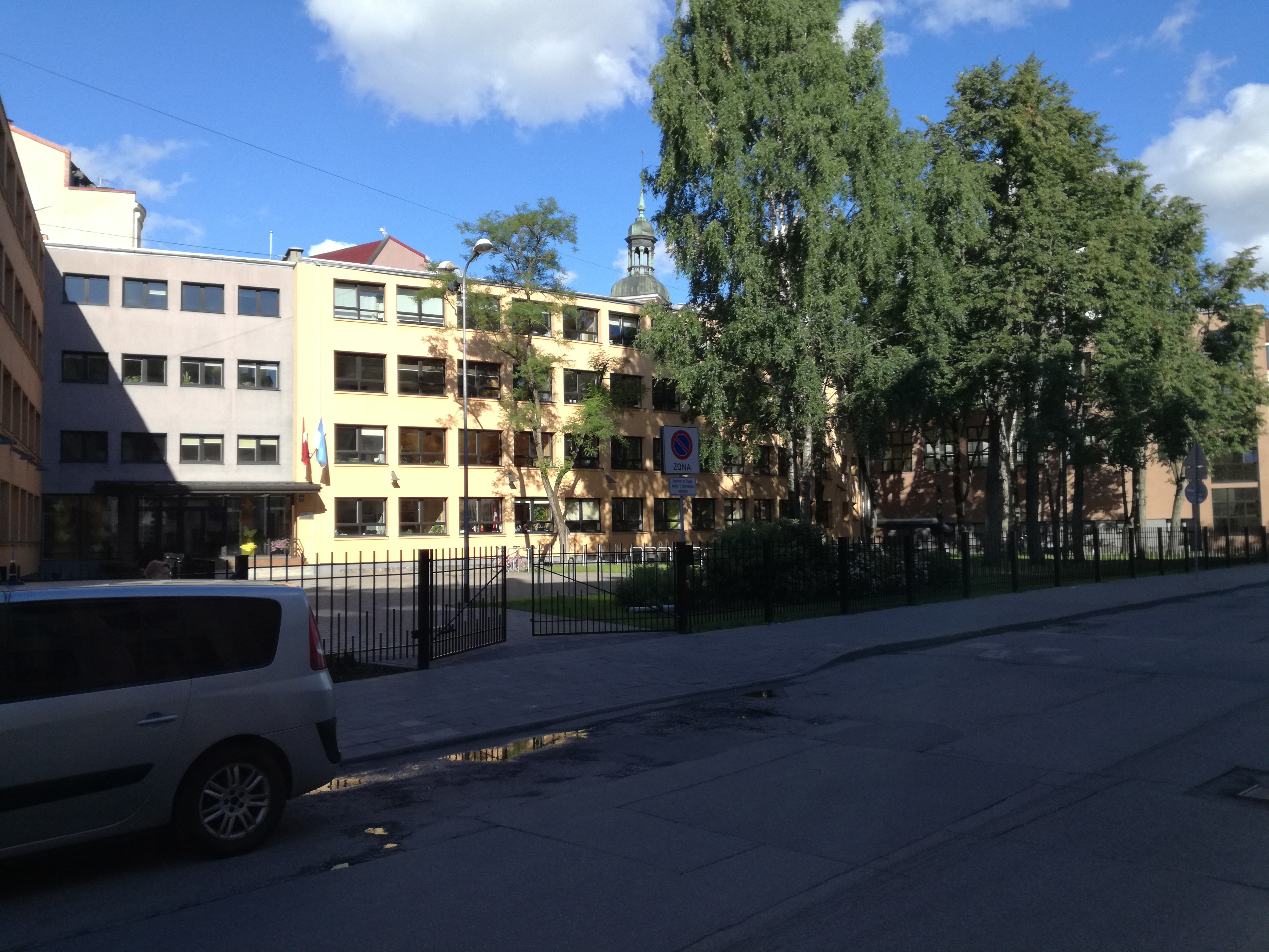 Вецрига